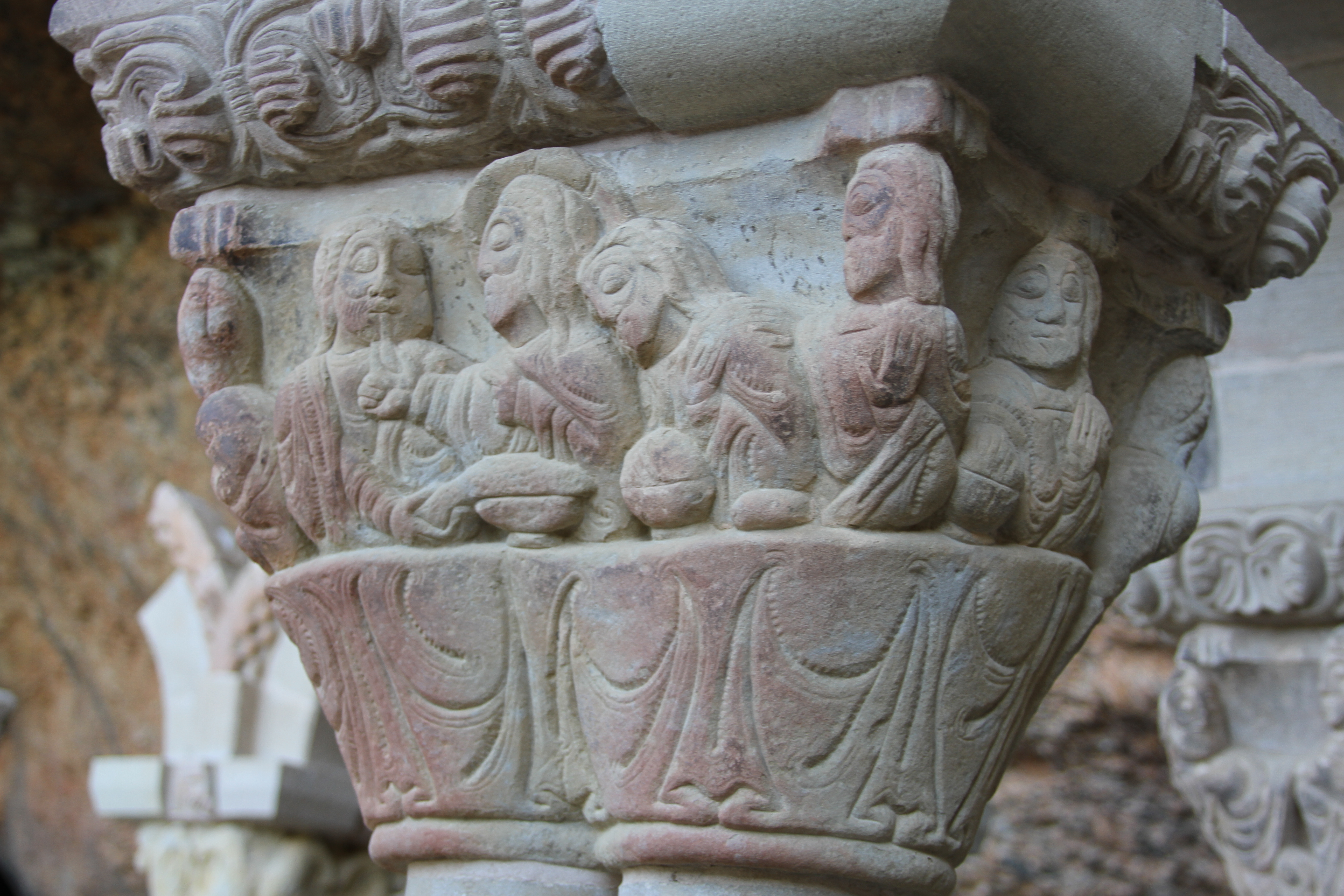 Monasterio Viejo de San Juan de la Peña, claustro, capitel románico, S. XII